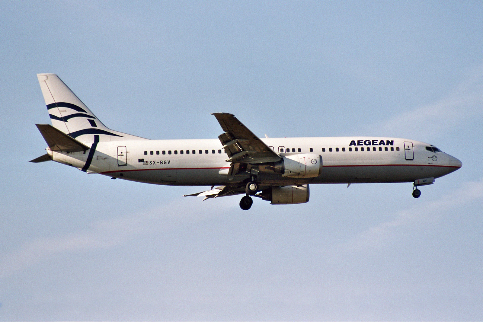 Frankfurt am Main (Rhein-Main AB) (FRA / EDDF / FRF) Germany 9.2004